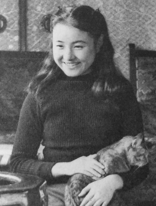 菱田美恵子